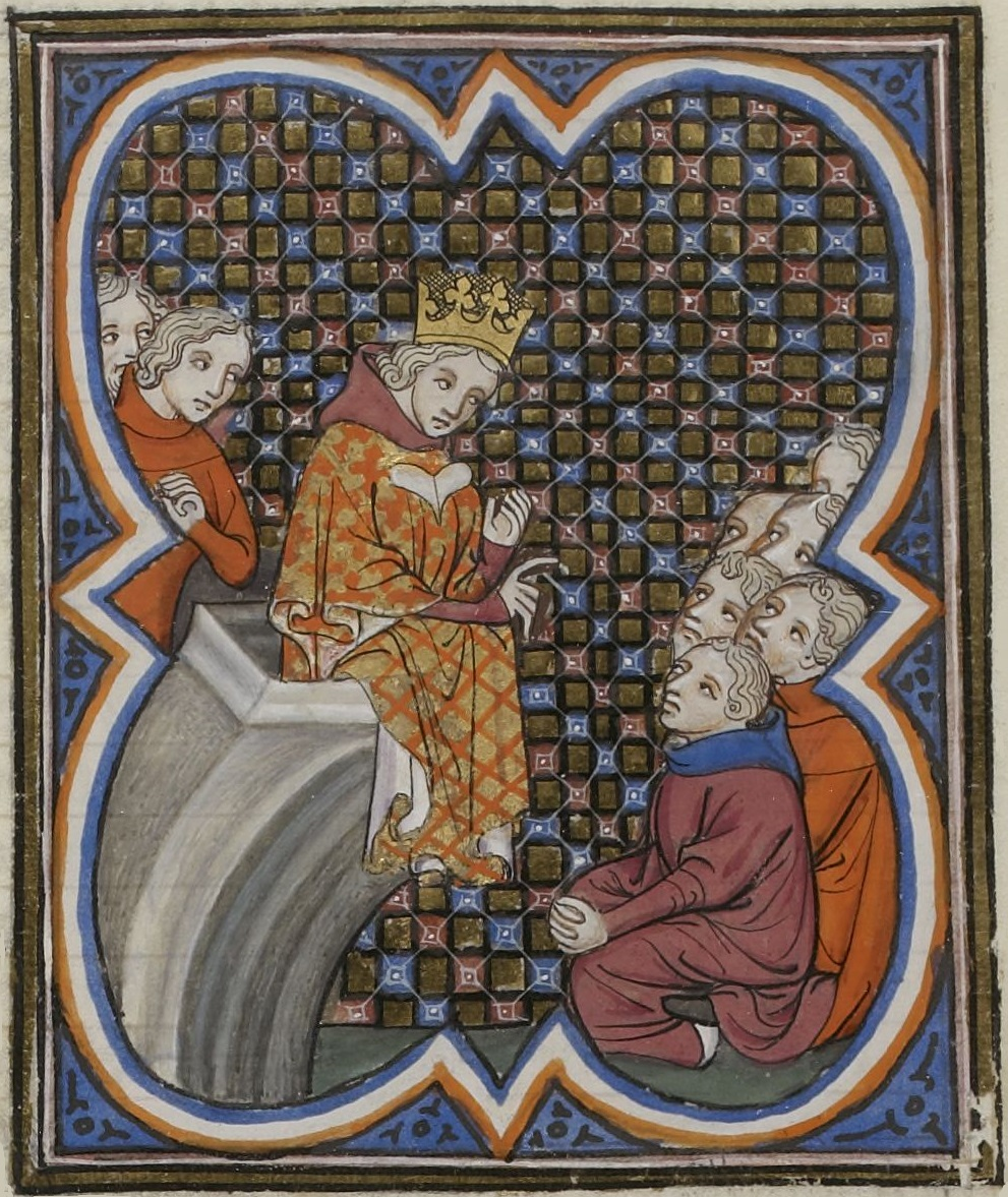 Charles le Mauvais, roi de Navarre, assis sur une estrade au Pré-aux-Clercs, haranguant les Parisiens. Enluminure des Grandes Chroniques de France, XIVe siècle. Paris, BnF, département des Manuscrits, Français 2813, folio 405 verso.